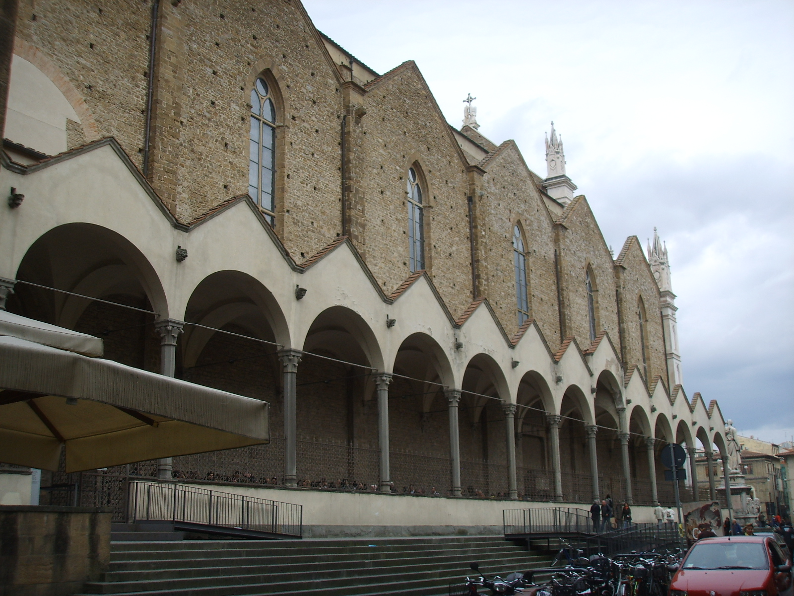 Santa croce, portico laterale su via san giuseppe